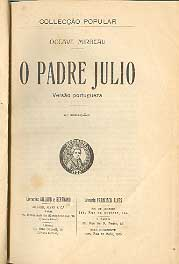 Traduction portugaise de L'Abbé Jules, d'Octave Mirbeau (1848-1917)